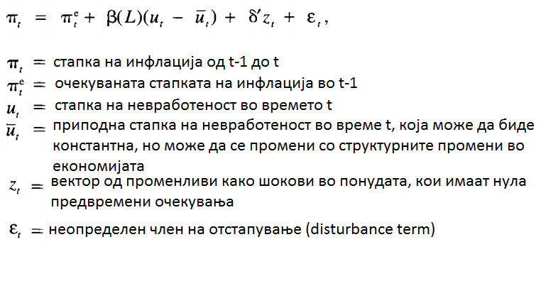 Концептот на природна стапка на невработеност доведува до следната карактеризација на кратокорочната Филипсова крива